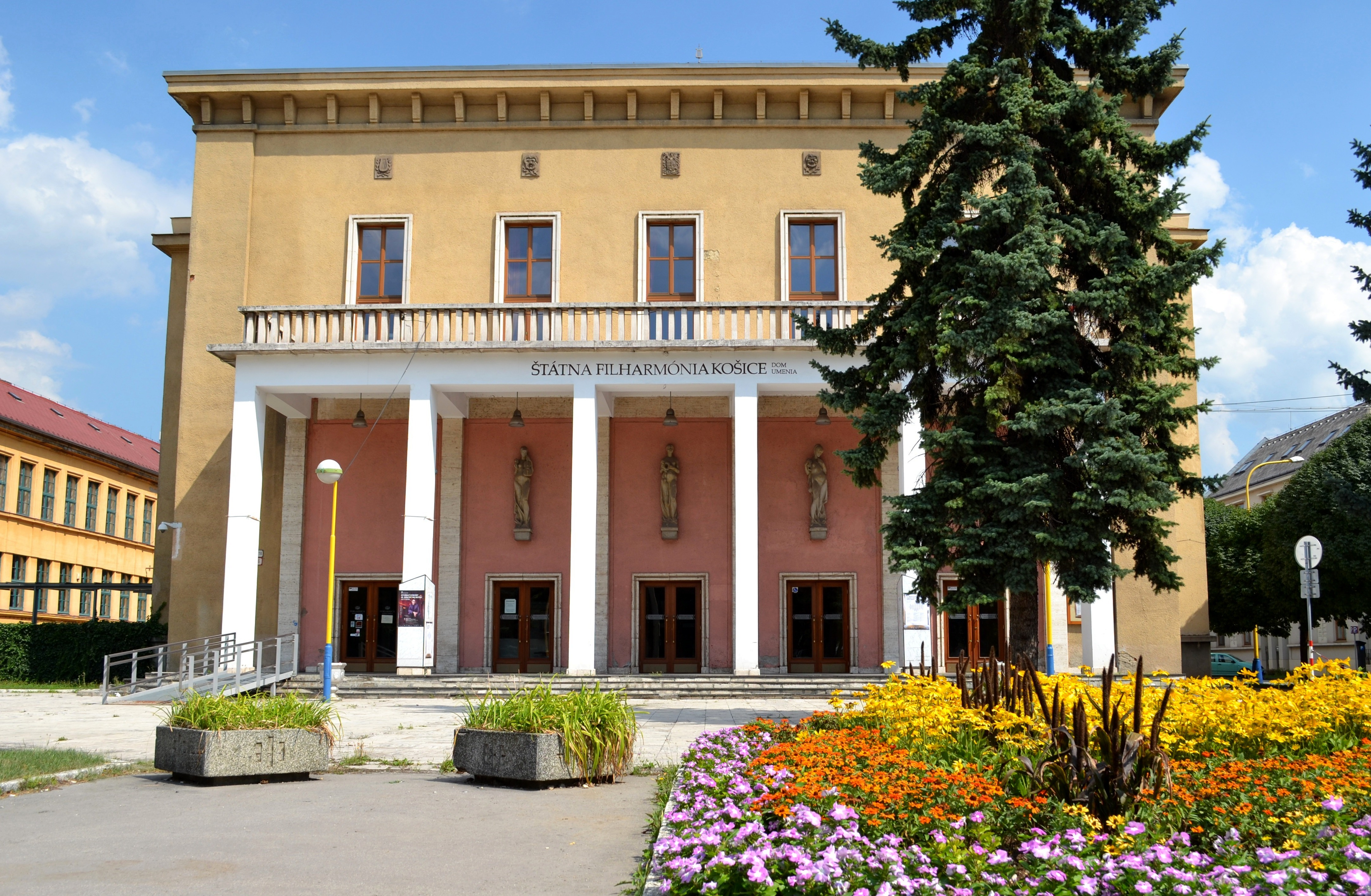 Košická neologická synagóga postavená v roku 1927